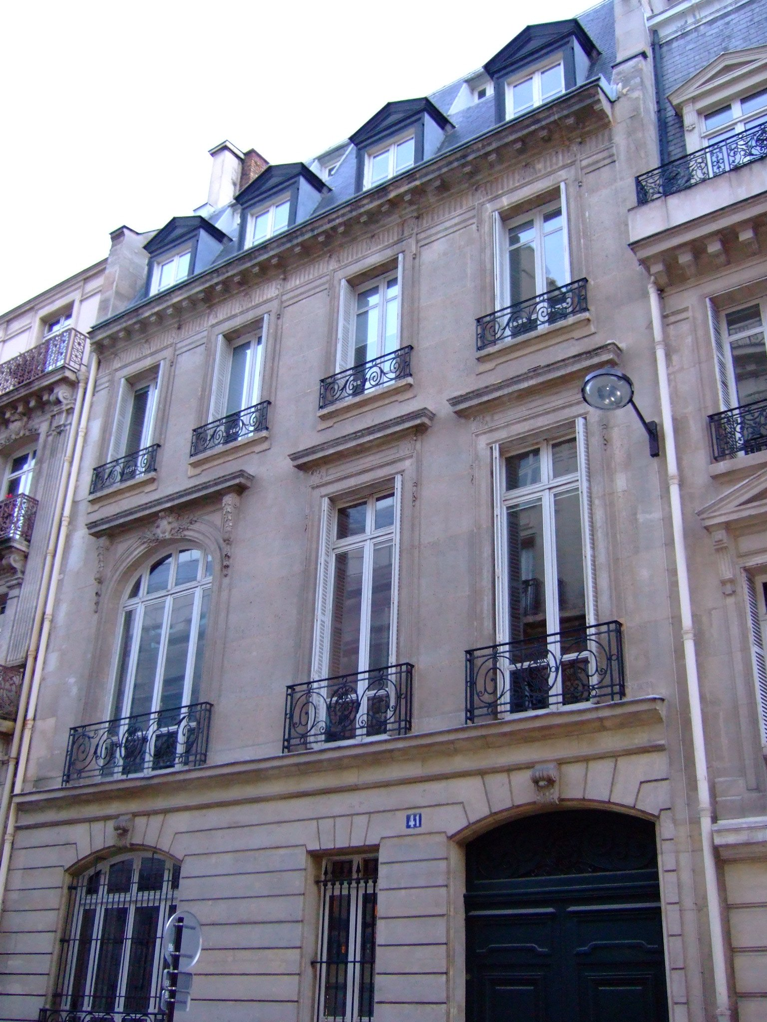 L'immeuble situé au 41, rue de la Bienfaisance à Paris, siège du quartier général de la campagne de Valéry Giscard d'Estaing en 1974. Photo amateur prise par moi-même.